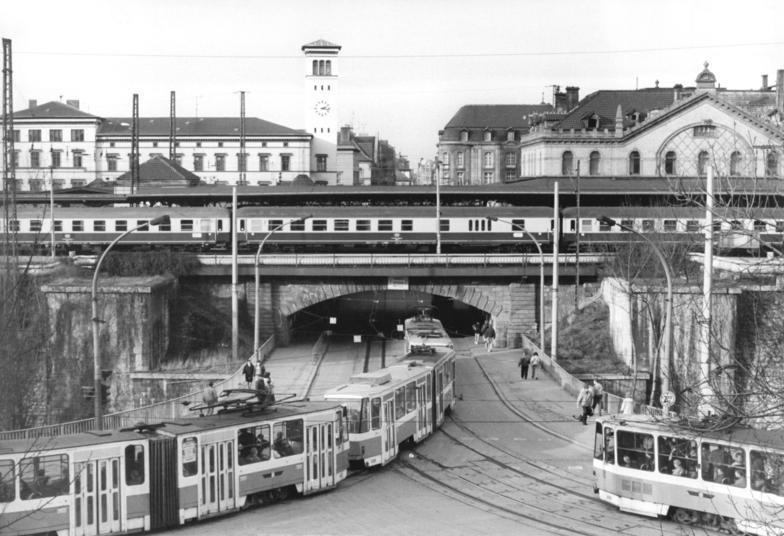 ADN-ZB-Hirndorf-15.2.1990-Erfurt: Sehr beliebt ist die Gegend am Erfurter Hauptbahnhof. Per Schiene und Straße sowie mit Schienenfahrzeugen auf der Straße werden die Passagiere befördert.